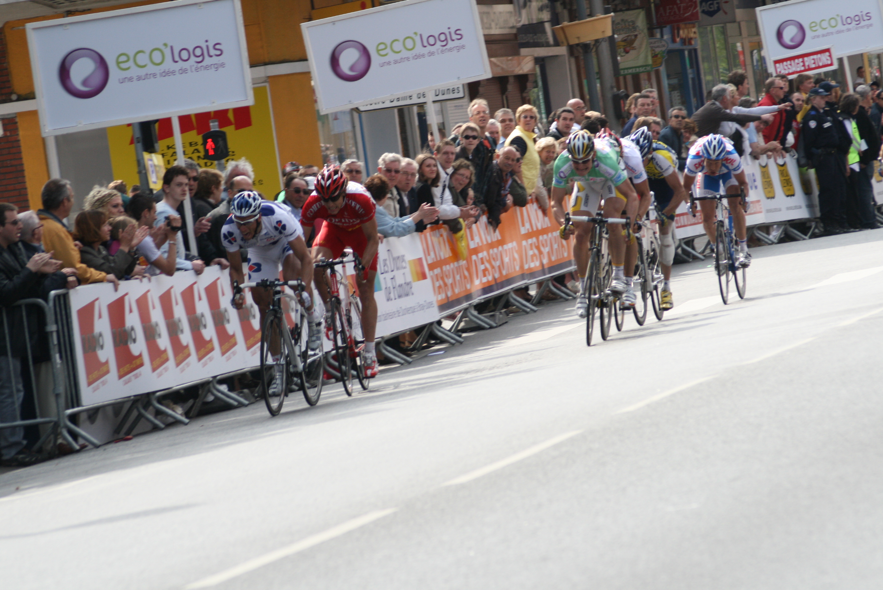 Arrivée de la dernière étape des Quatre jours de Dunkerque 2009 : Sébastien Chavanel, Alexandre Blain, André Greipel, Jurgen Roelandts, Baden Cooke, Kenny Van Hummel (de gauche à droite)